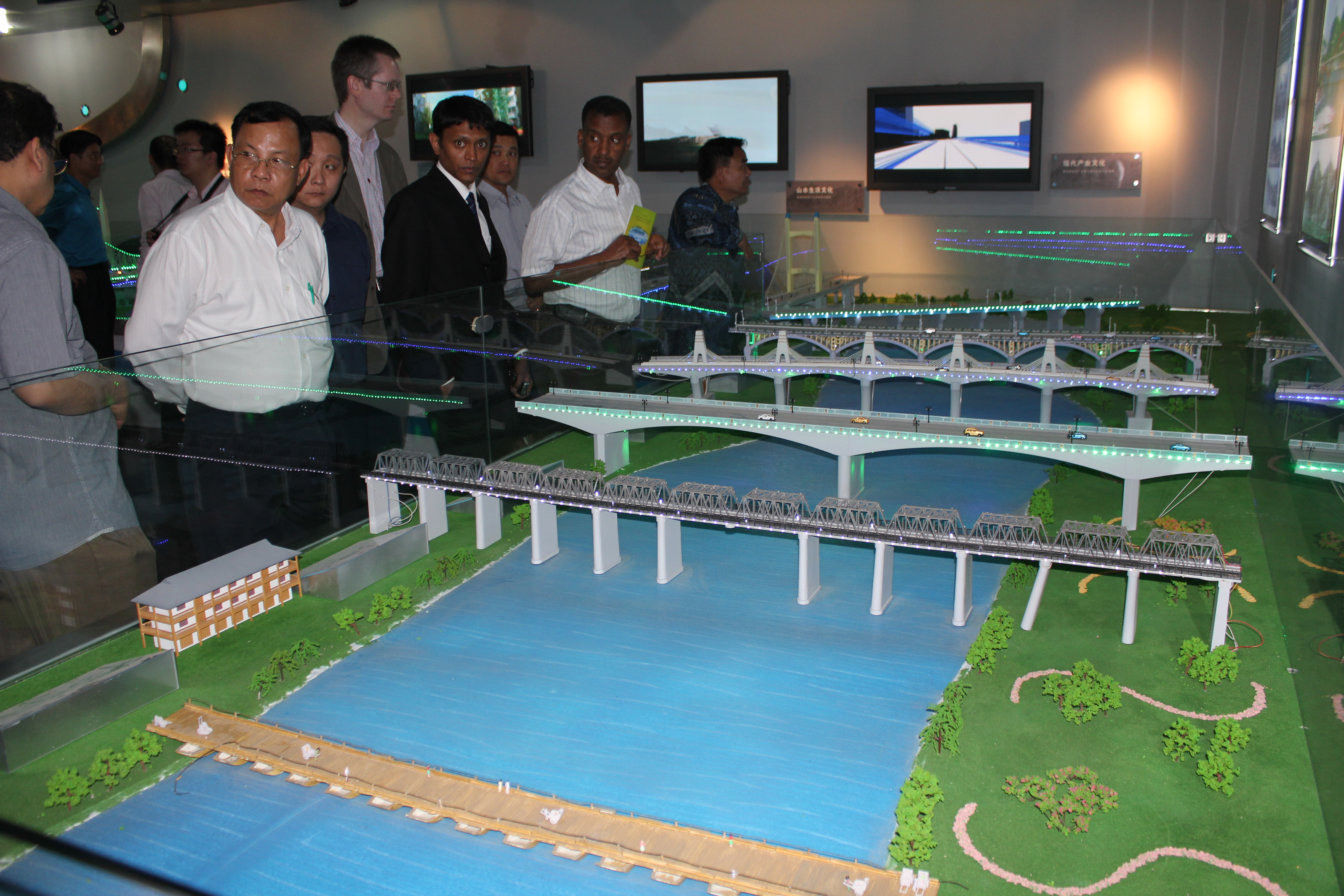 柳州的桥梁模型